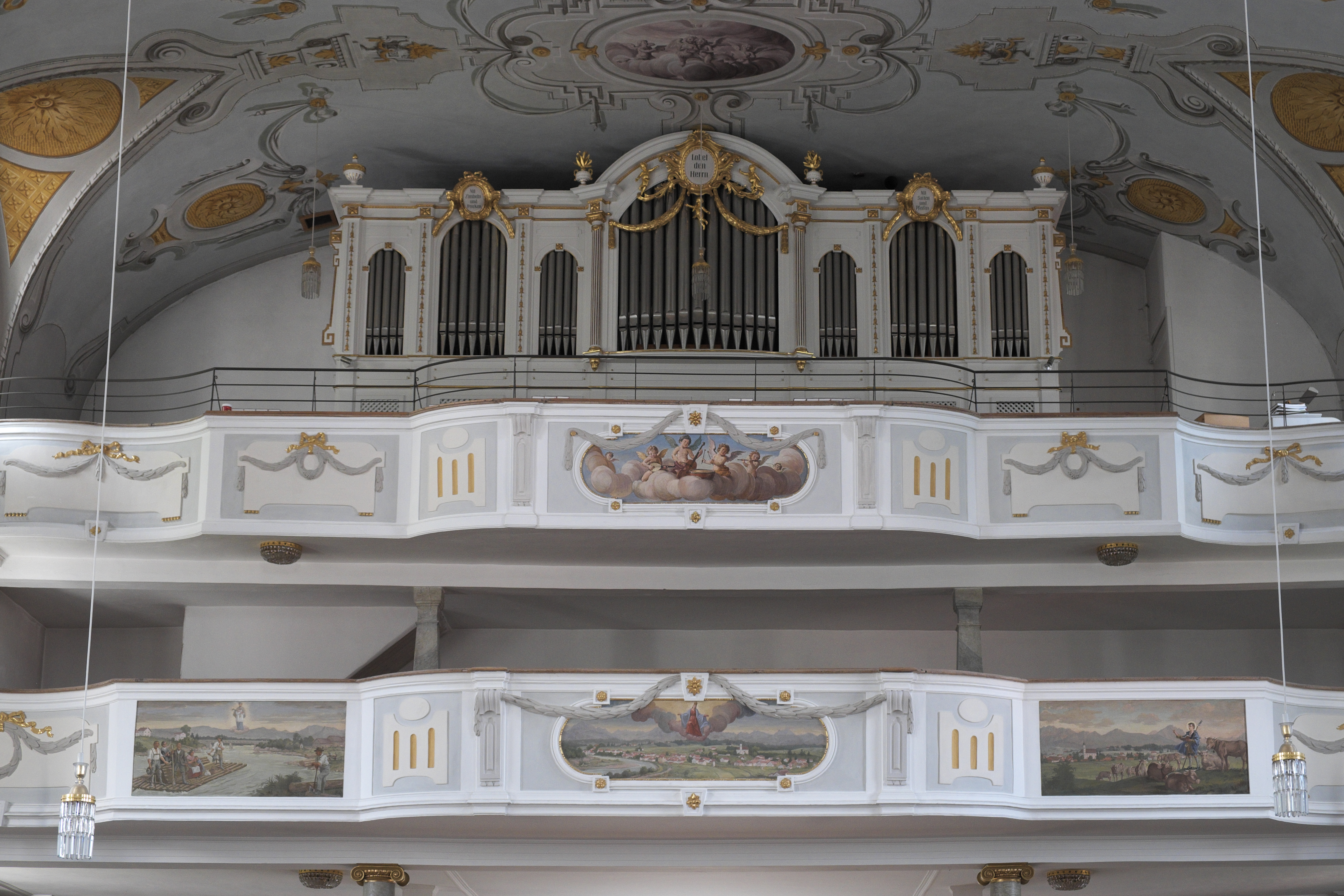 Katholische Pfarrkirche Mariä Heimsuchung in Lechbruck am See im Landkreis Ostallgäu (Bayern/Deutschland), Orgelempore